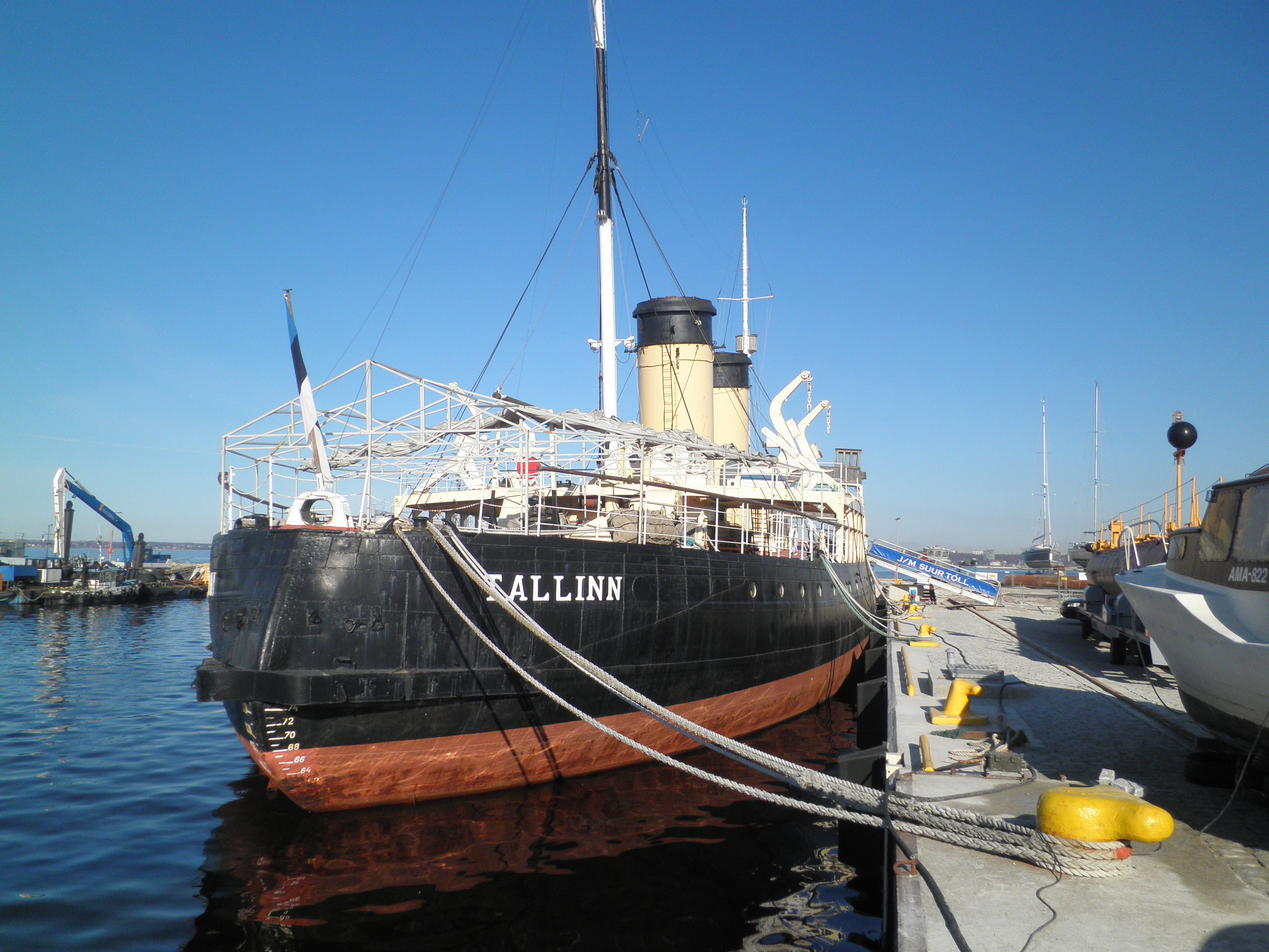 Eisbrecher Suur Tõll im Estnischen Meeresmuseum in Tallinn